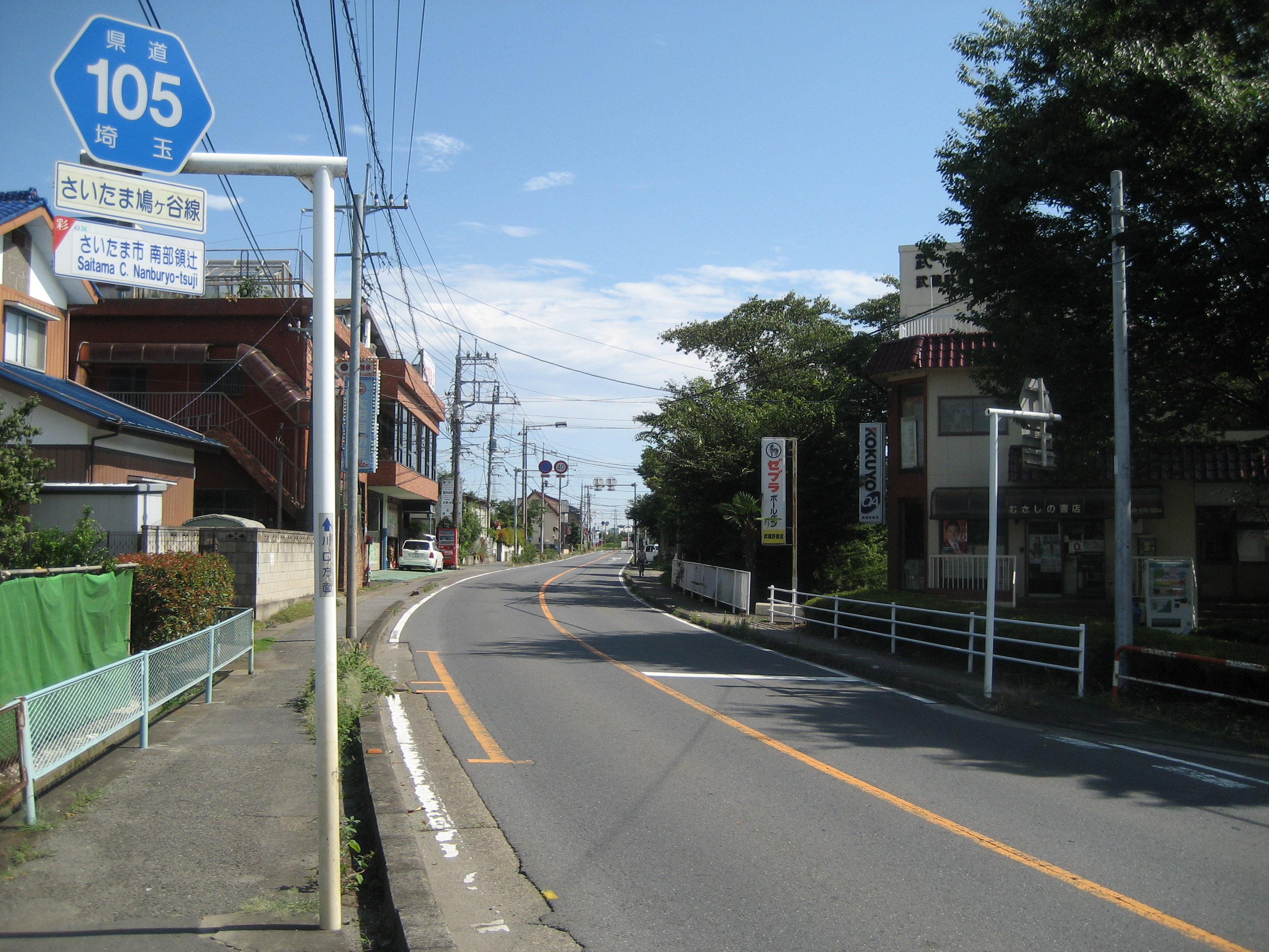 埼玉県道105号線さいたま市緑区南部領辻付近